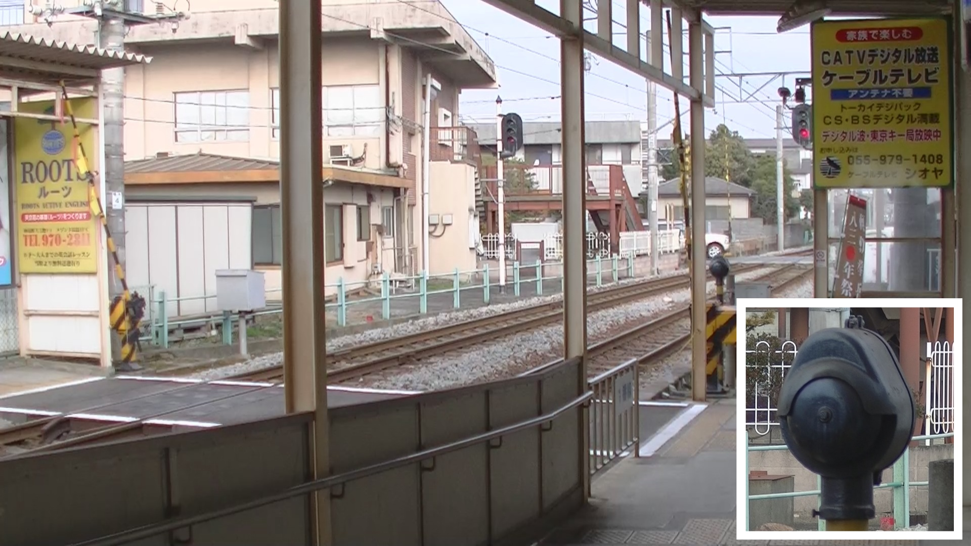 伊豆箱根鉄道 伊豆仁田駅構内踏切と電鈴式警音器